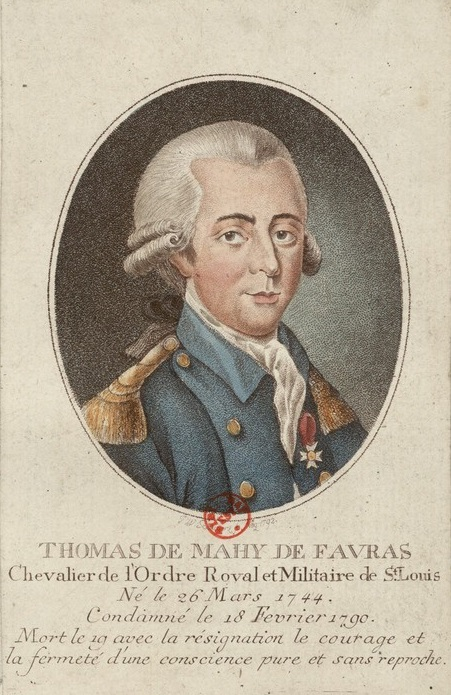 Thomas de Mahy de Favras : chevalier de l'Ordre royal et militaire de St Louis né le 26 mars 1744 condamné le 18 fevrier 1790 mort le 19 avec la résignation le courage et la fermeté d'une conscience pure et sans reproche, estampe.